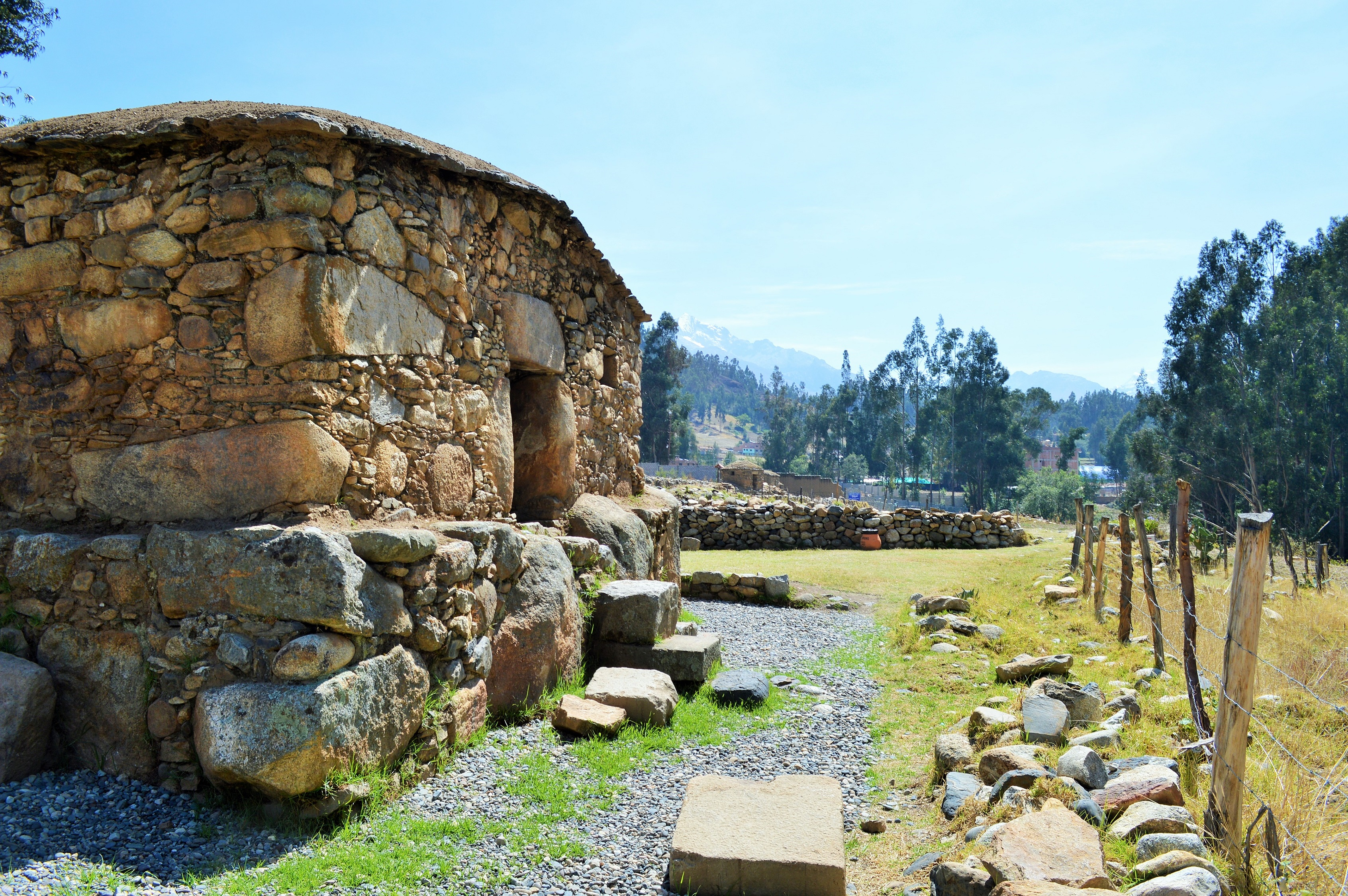 Sitio arqueológico de Waullac (culturas Recuay y Wari) en el distrito de Independencia, provincia de Huaraz, Áncash - Perú. Foto tomada en la mañana del sábado 5 de octubre de 2019.